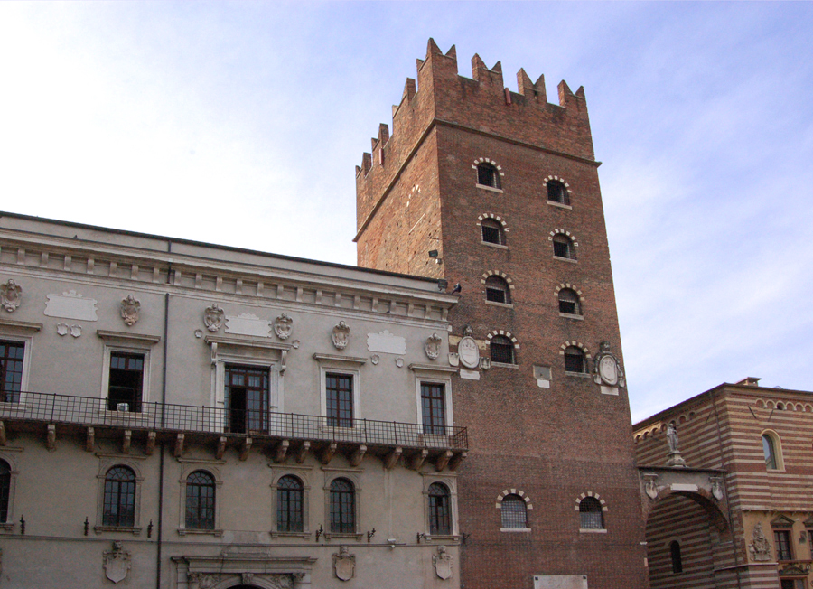 Il palazzo di Cansignorio Della Scala, in Piazza dei Signori, a Verona